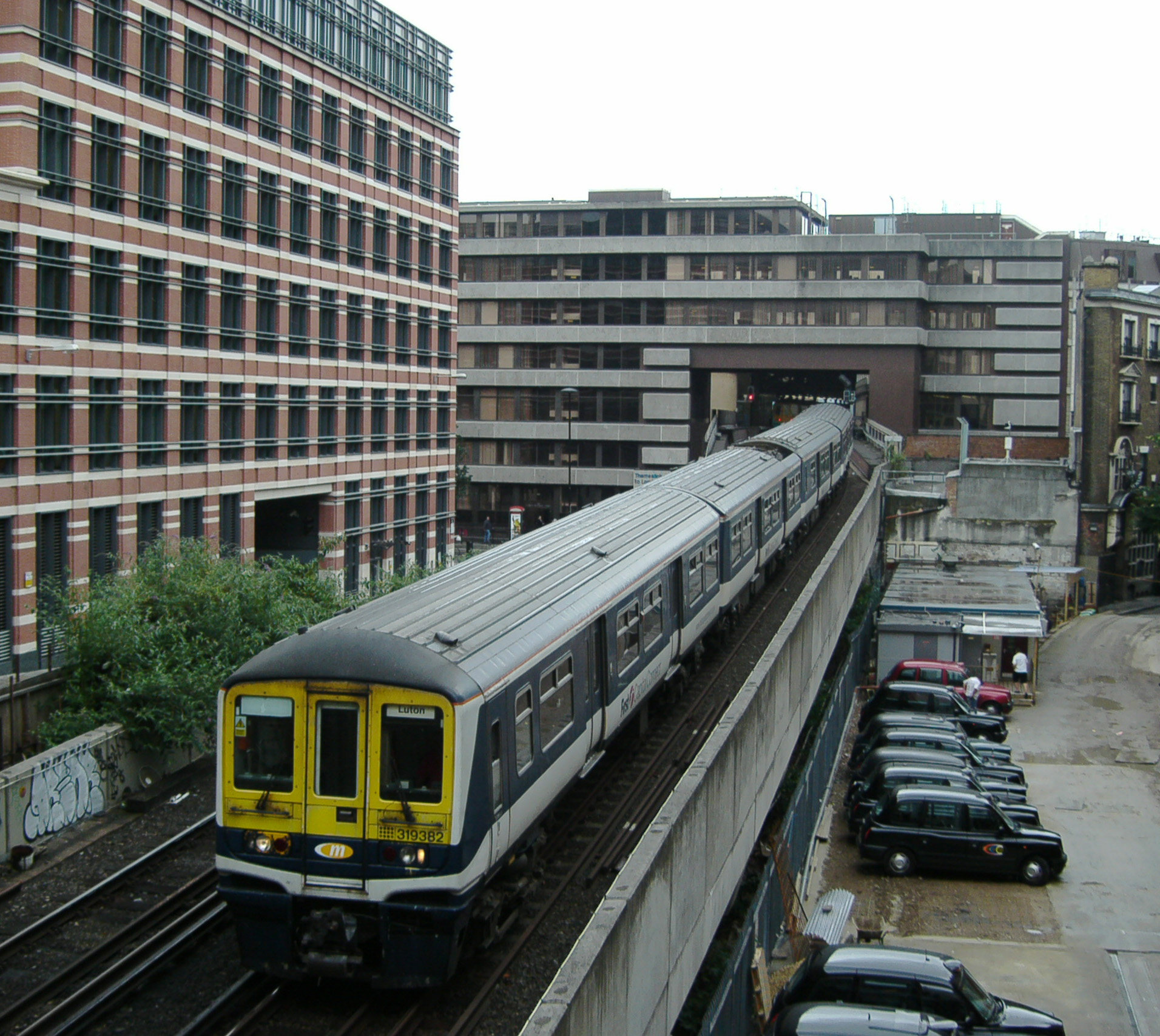 Thameslink-Zug der First Capital Connect bei Verlassen von Blackfriars Richtung Norden